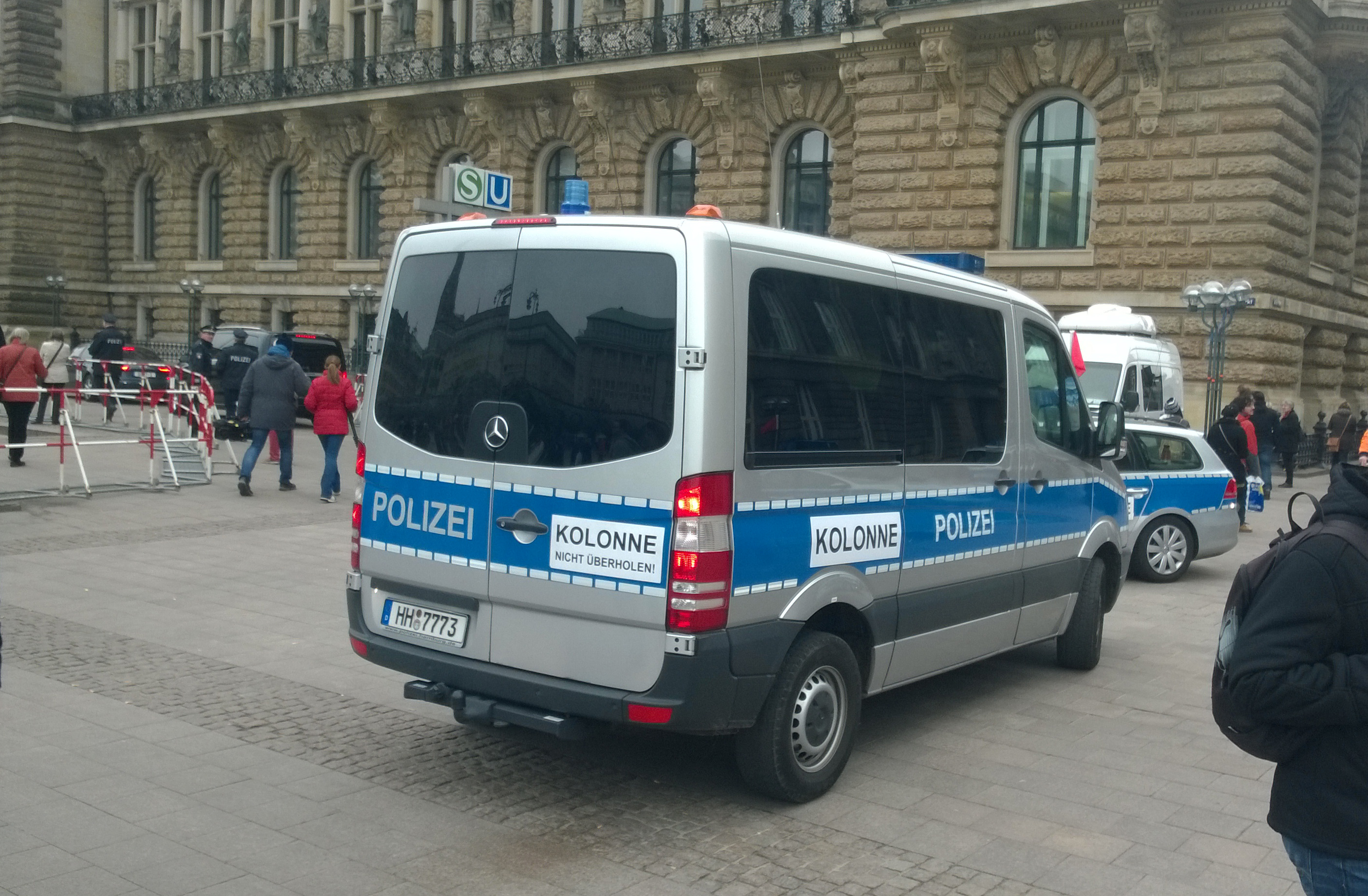 Kolonne Magnetschilder an einem Hamburger Polizeifahrzeug